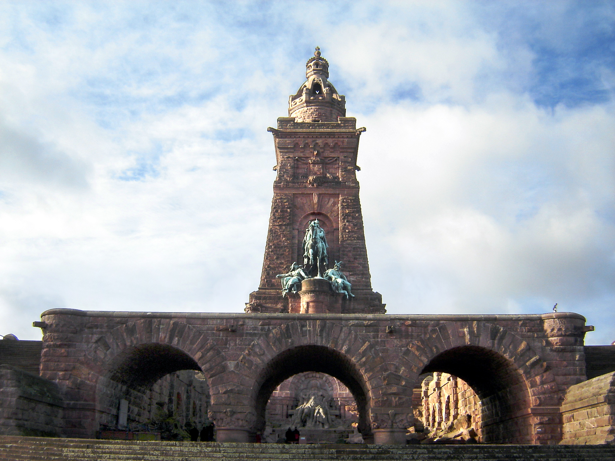 Kyffhäuserdenkmal, Thüringen - Kaiser Wilhelm I und Kaiser Friedrich Barbarossa